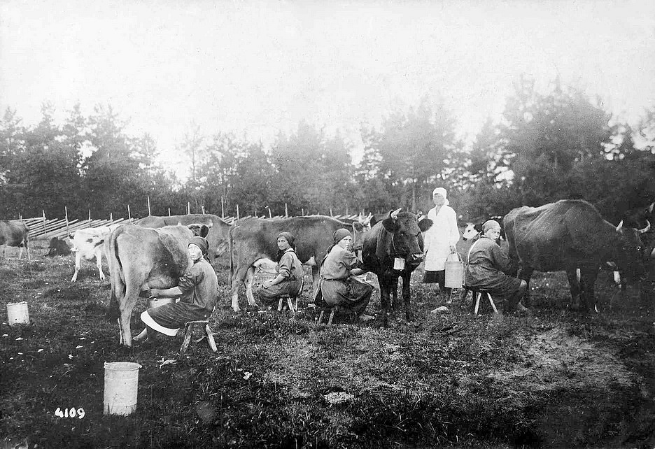 Финский национальный колхоз «Красная Авлога» в деревне Верхние Никулясы. Северная Ингерманландия, Токсовский финский национальный район.